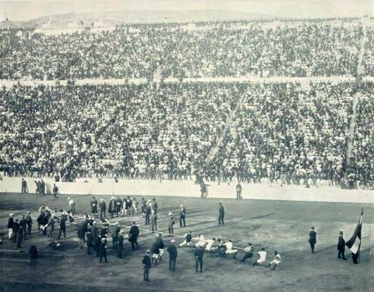 Le Tir à la corde dans le stade d'Atène, lors des Jeux intercalaires de 1906.